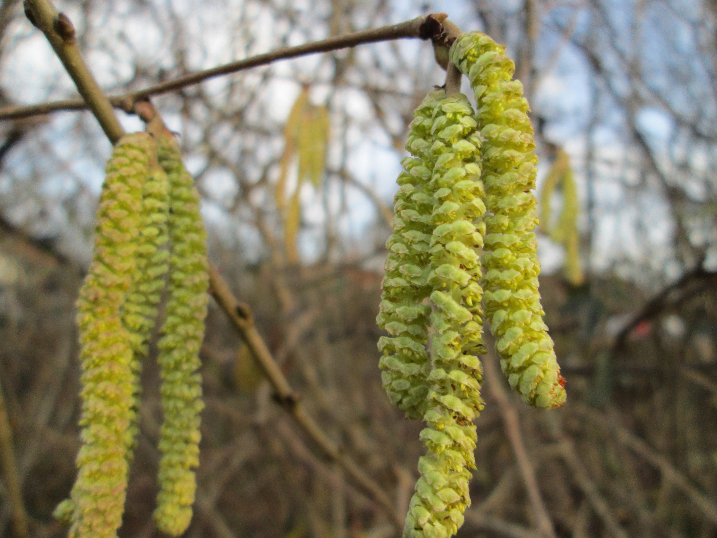 Frühe Haselblüte im Januar 2018: Blühende Haselnuss (Corylus avellana) in Hockenheim - einer der wenigen einheimischen Winterblüher in Mitteleuropa